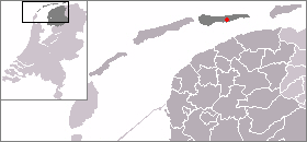 Locatie van Buren, zelf gemaakt uit sjabloon van Wikipedia-gebruiker Mtcv